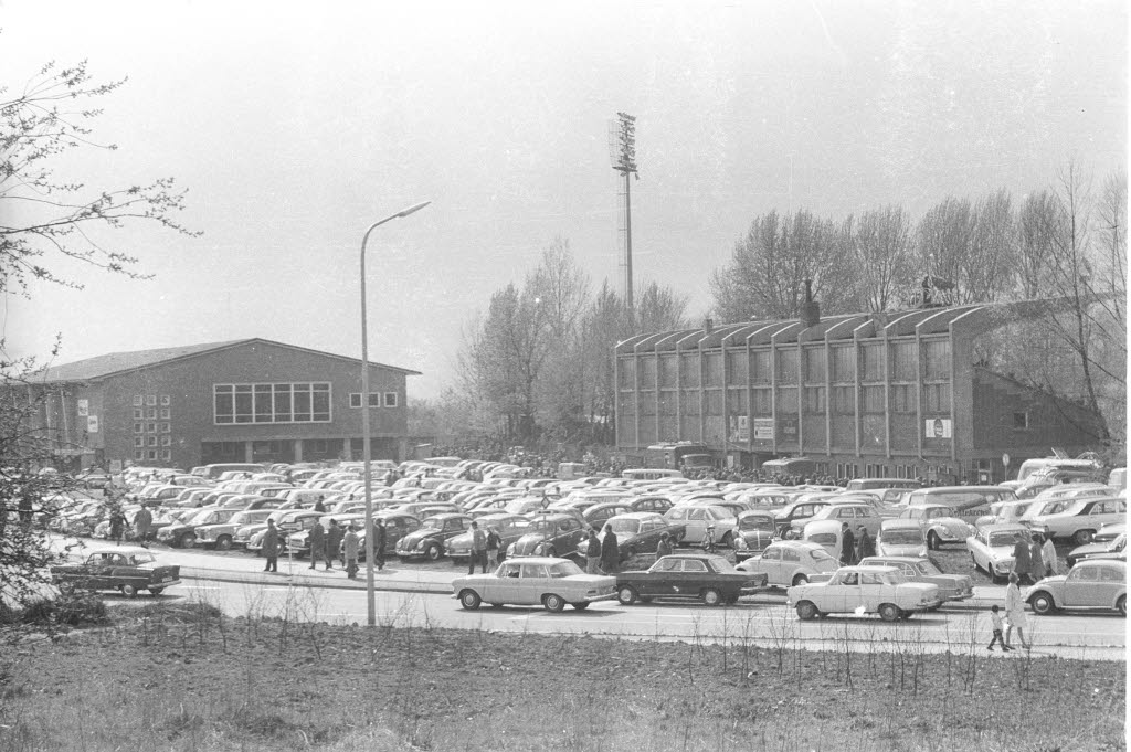 während des Regionalligaspiels gegen Göttingen 05. 17.000 Zuschauer sind gekommen.